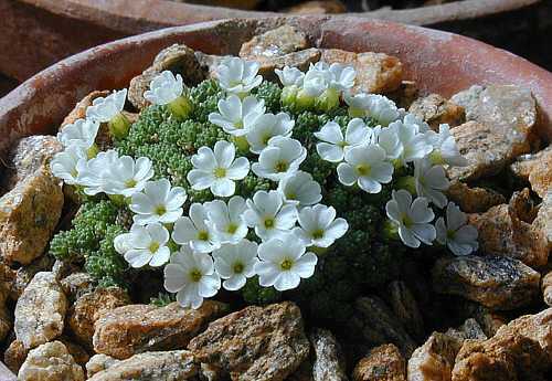 Plante en coussin à très petites rosettes serrées, qui pousse sur les parois rocheuses calcaire du Pamir vers 2200 m. Fleur acaule de 6 mm de diamètre.